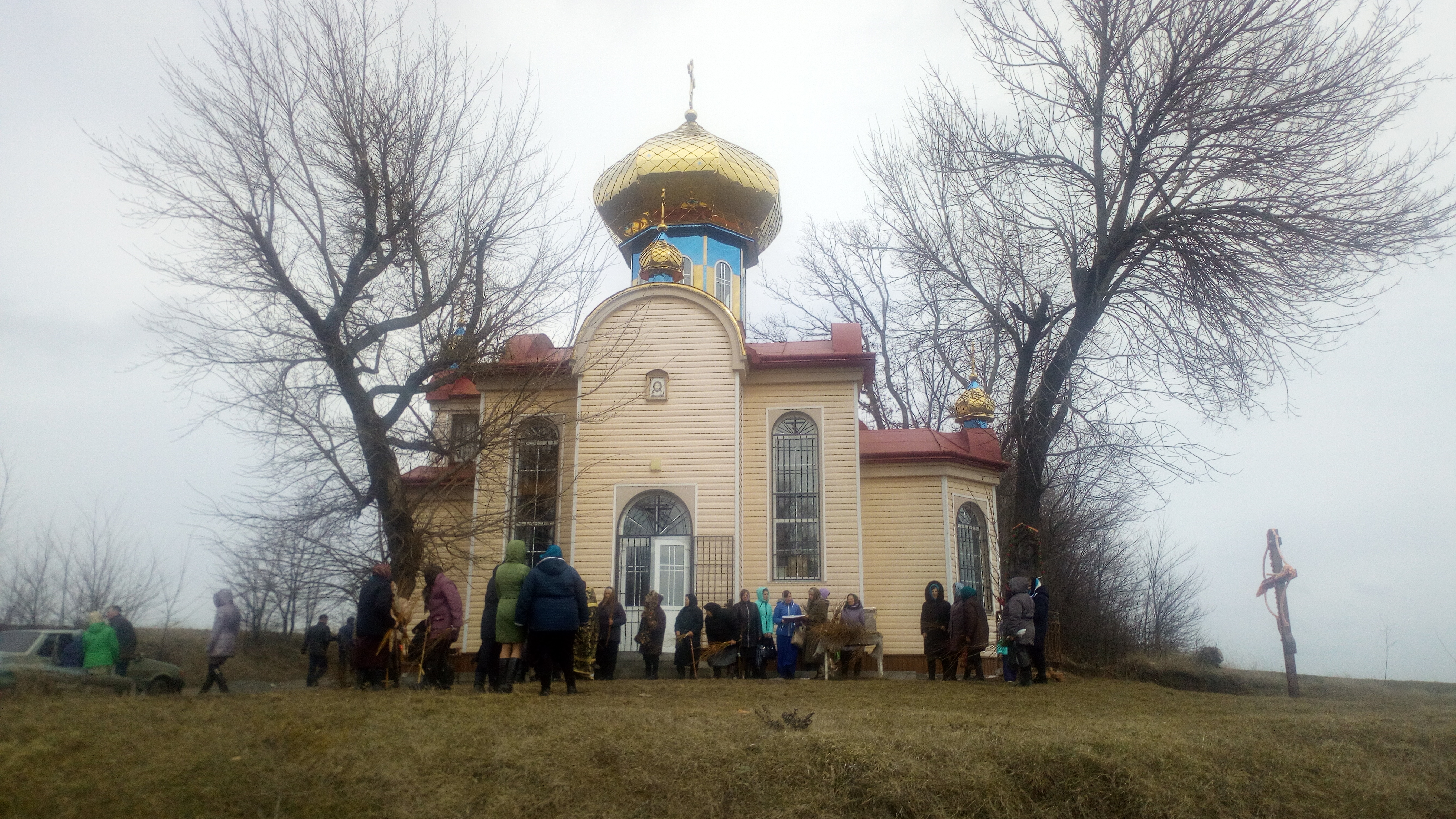 Храм нерукотворному образу Христа Спасителяв селі Половинники